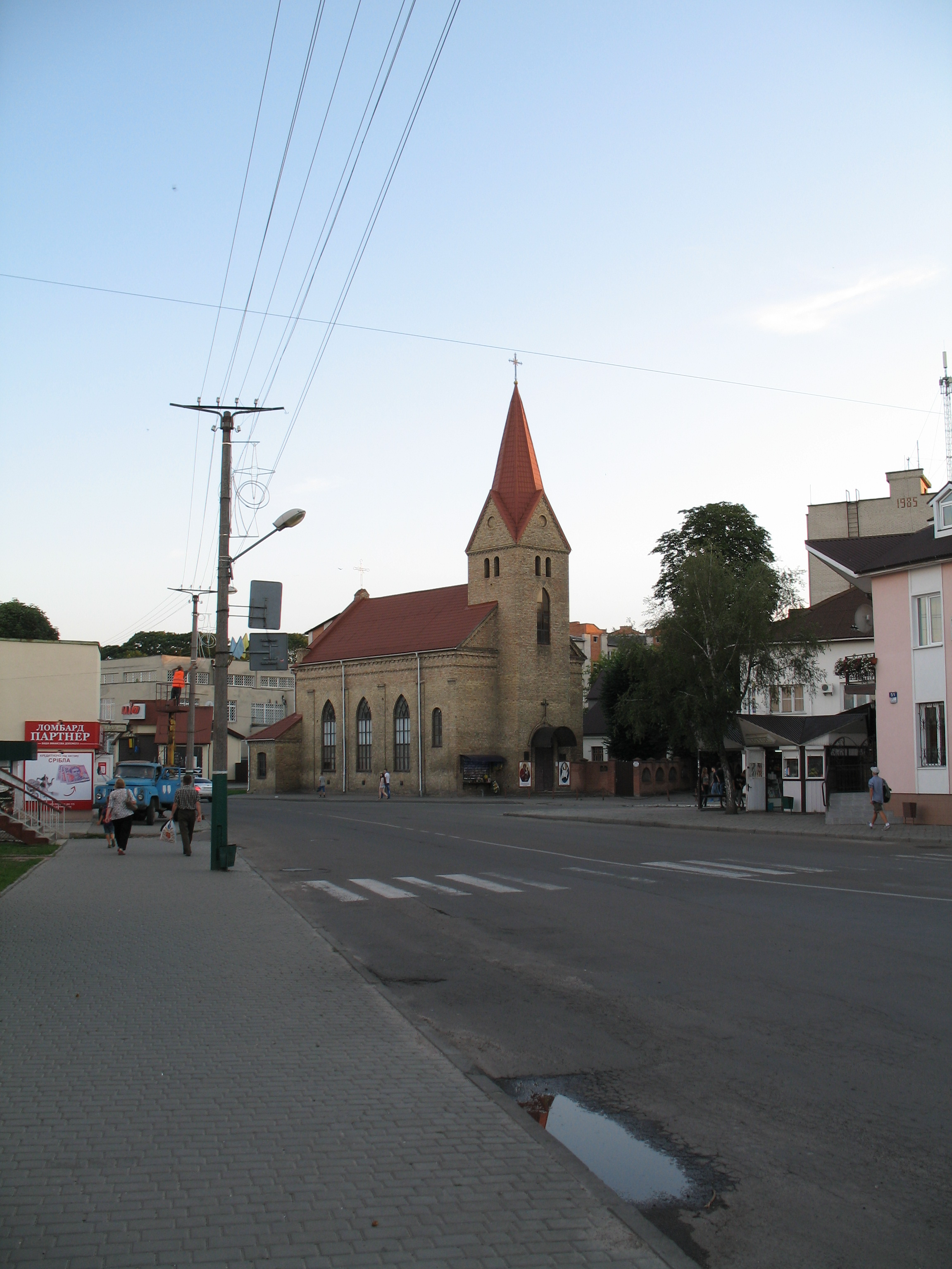 Володимир Волинський. Кірха (нині - греко-католицька церква святого Йосафата)